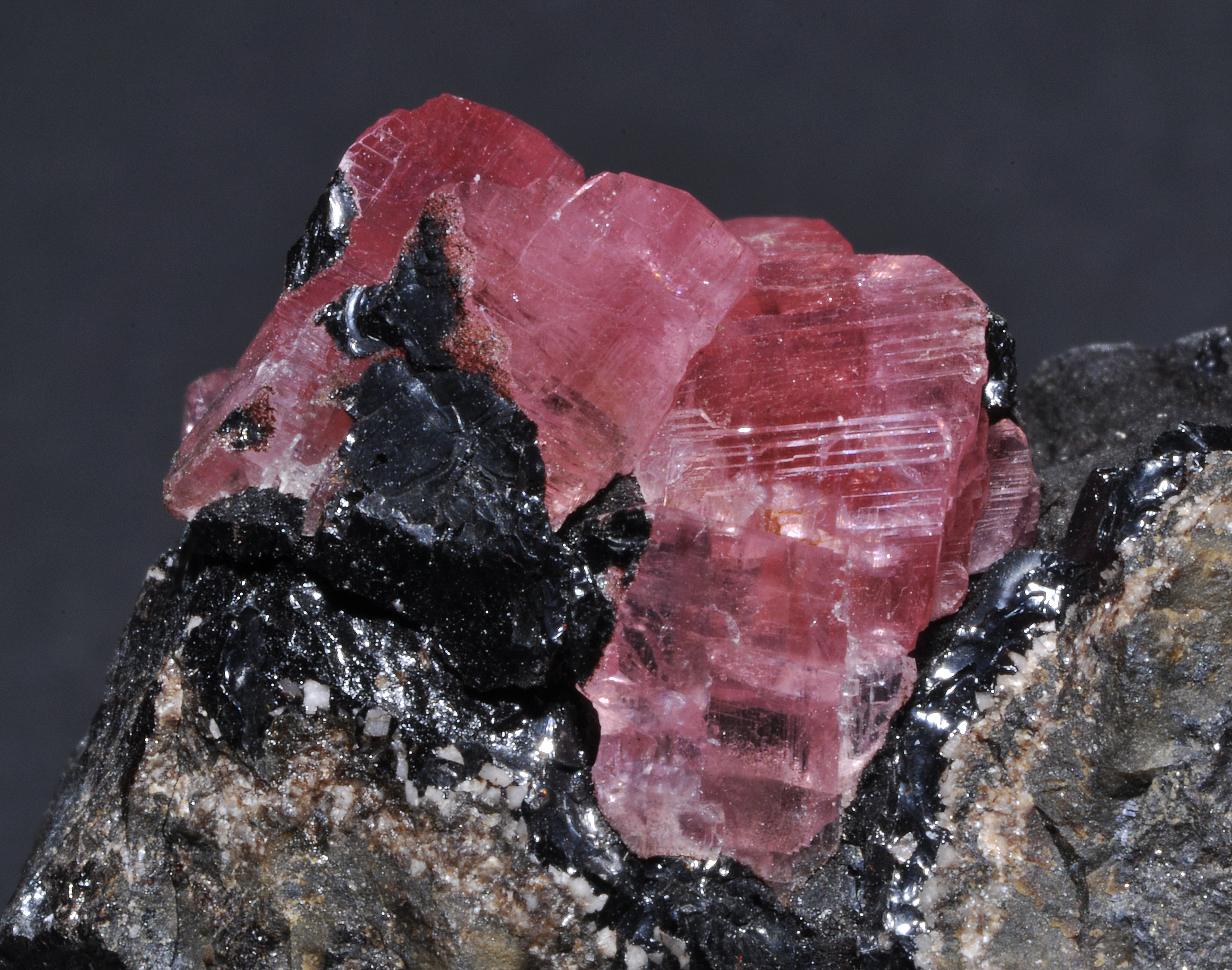 cristaux de rhodocrosite sur manganèse